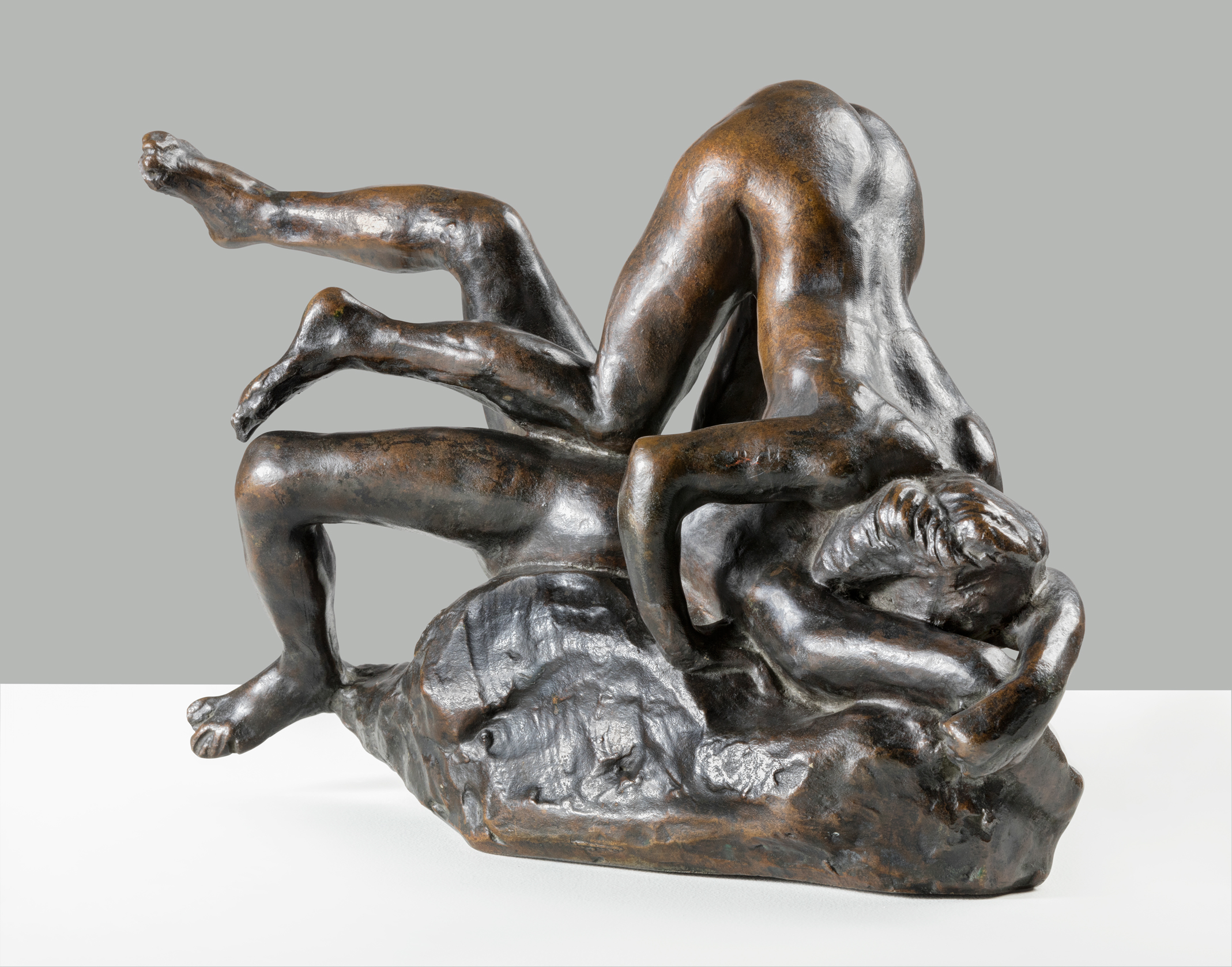 La era de Rodin Colección Museo Soumaya